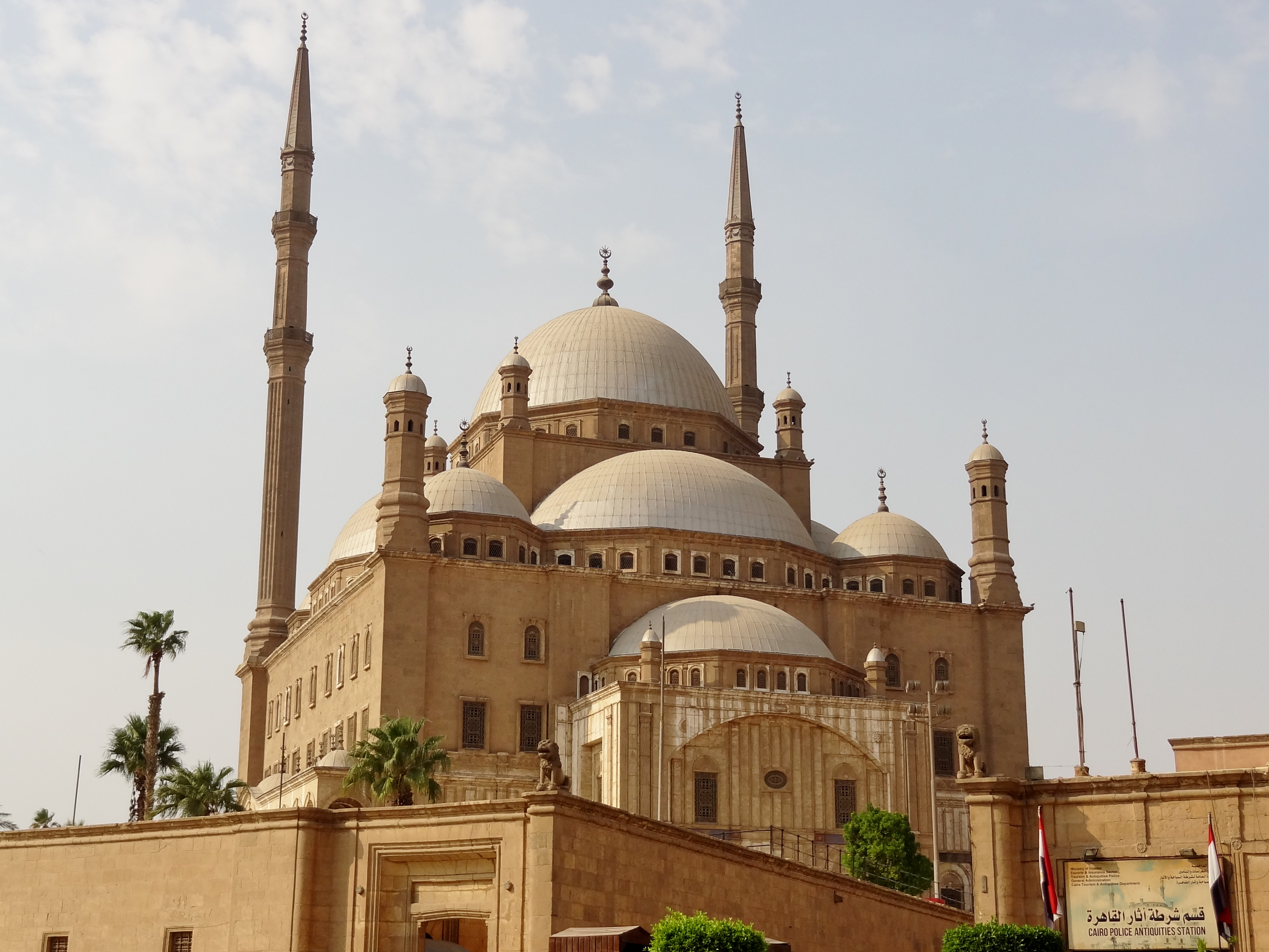 Unter Muhammad Ali errichtete Moschee in der Zitadelle von Kairo, Ägypten